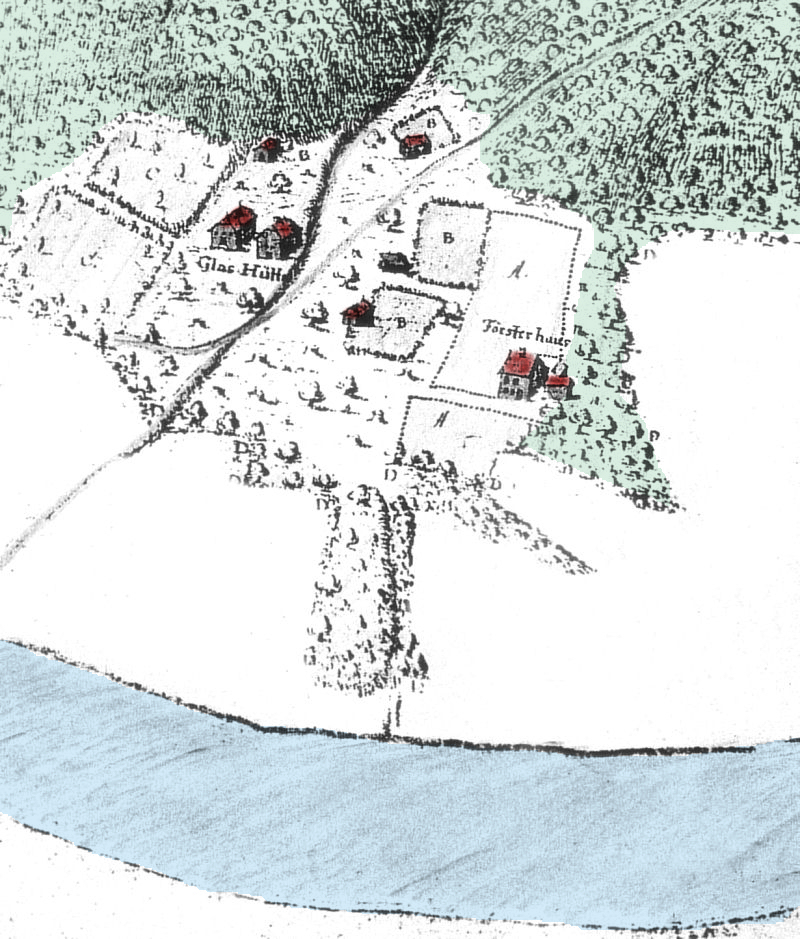 Fürstliche Kristallinglashütte zu Altmünden hessisches Forsthaus